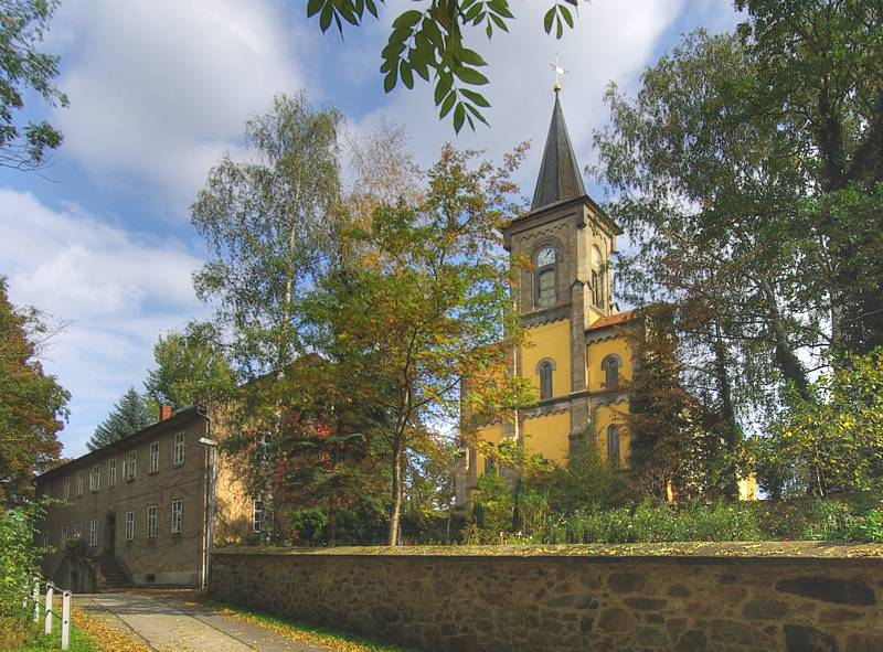 Bischdorf bei Löbau - Kirche und Pfarrhaus